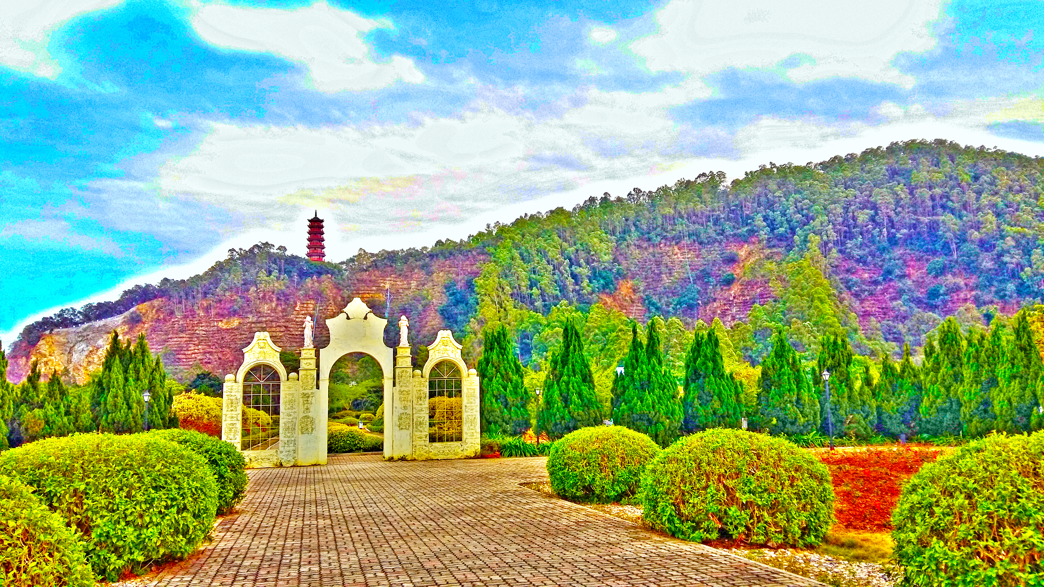 粵語: 喺蒲州花园望去大角山嗰边